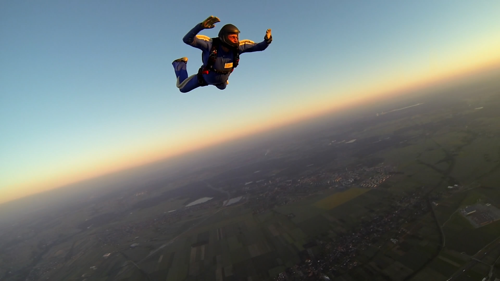 Włodzimierz Karsznia — Sekcja Spadochronowa Aeroklubu Gliwickiego